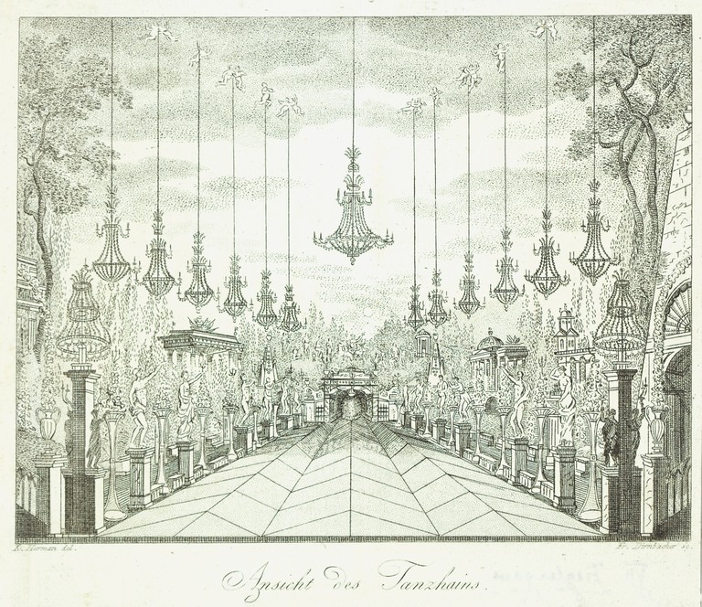 Ansicht des Tanzhains im Apollo-Saal in Wien.